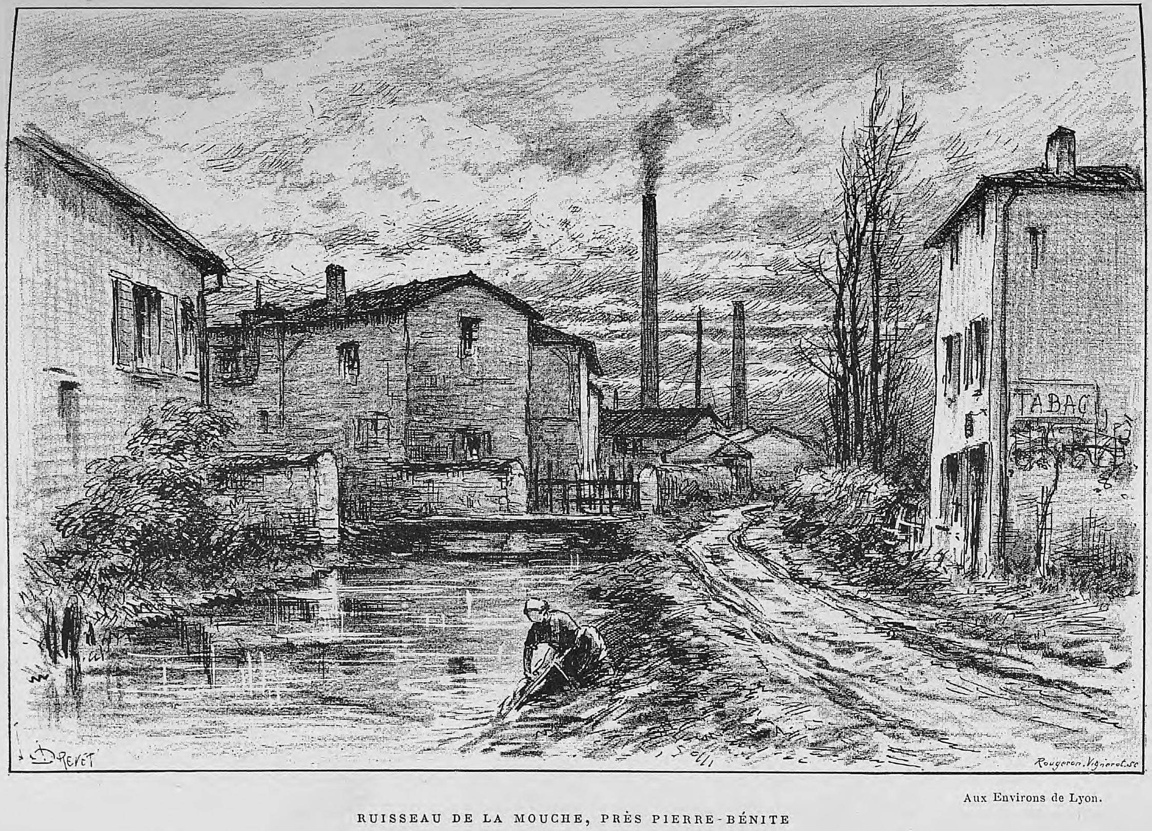 Aux environs de Lyon / Monsieur Josse ; préface de M. Coste-Labaume ; édition illustrée de 250 dessins de J. Drevet.